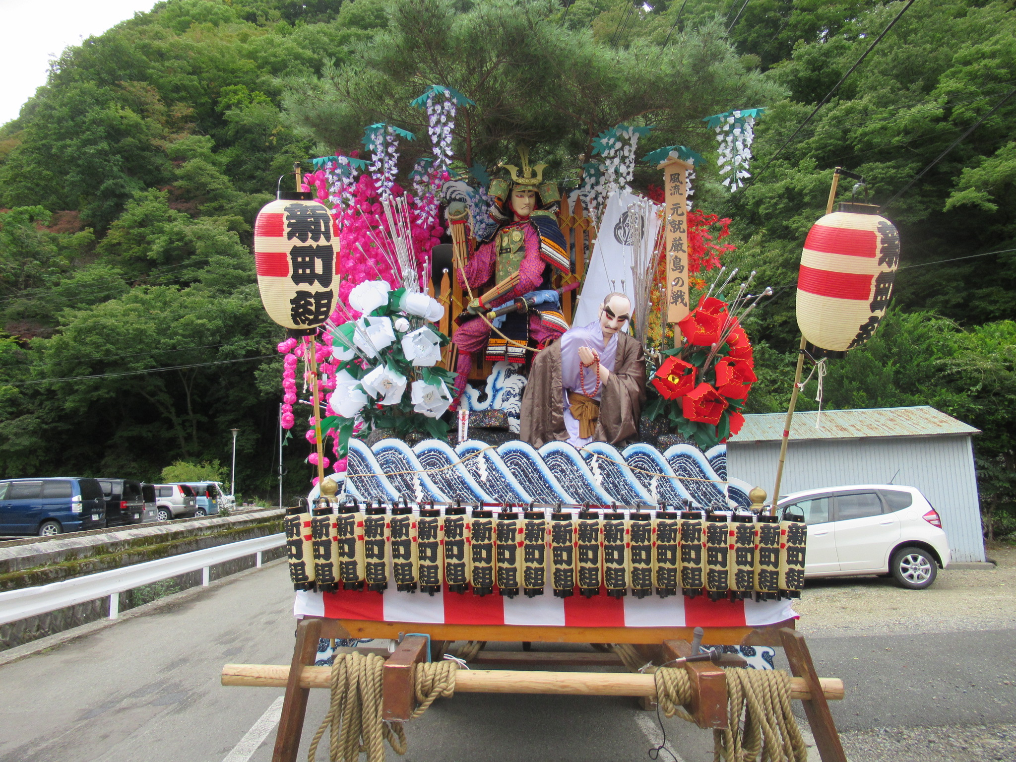 くずまき秋まつりで運行される山車。